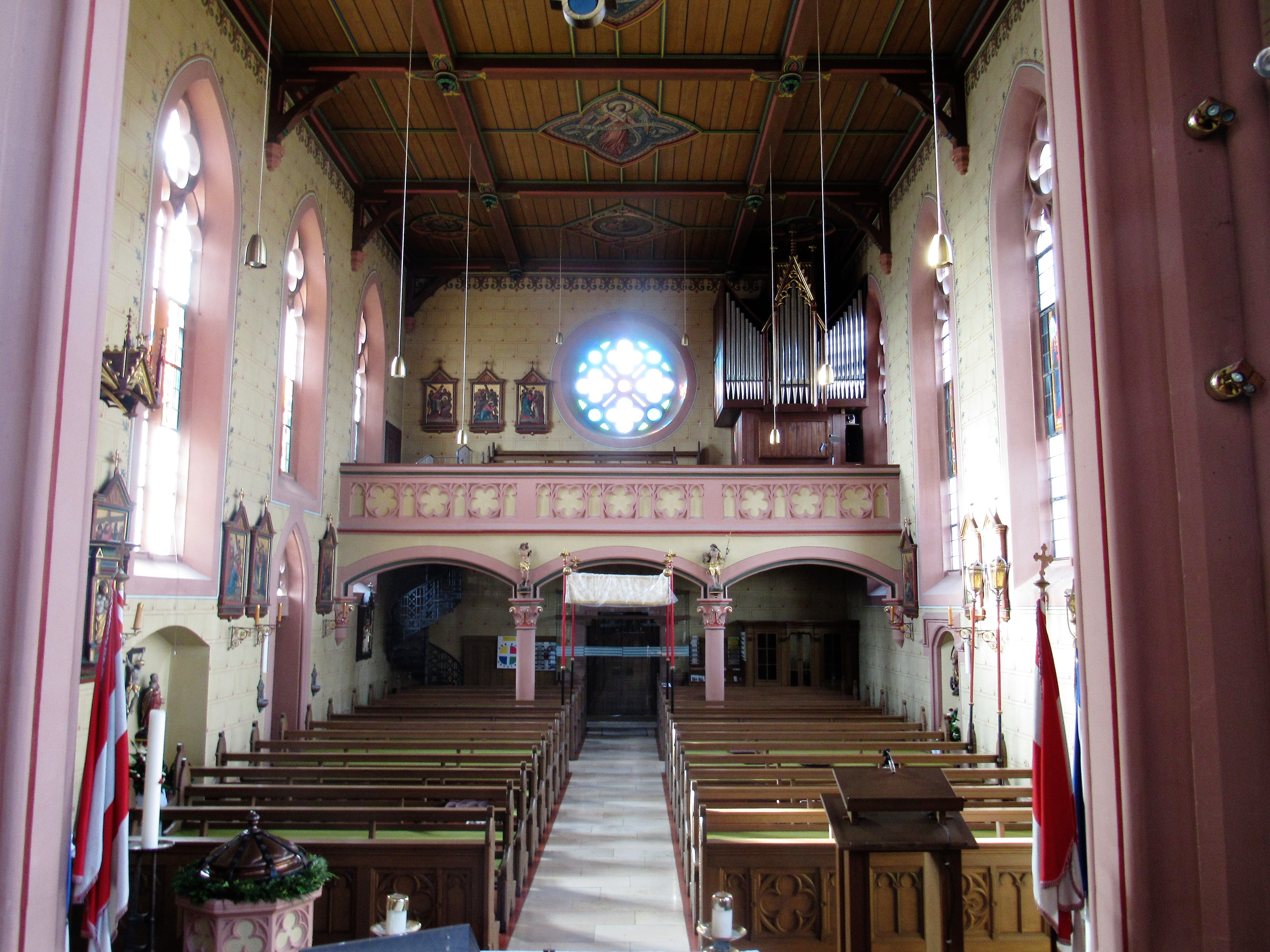 Innenraum der Kirche